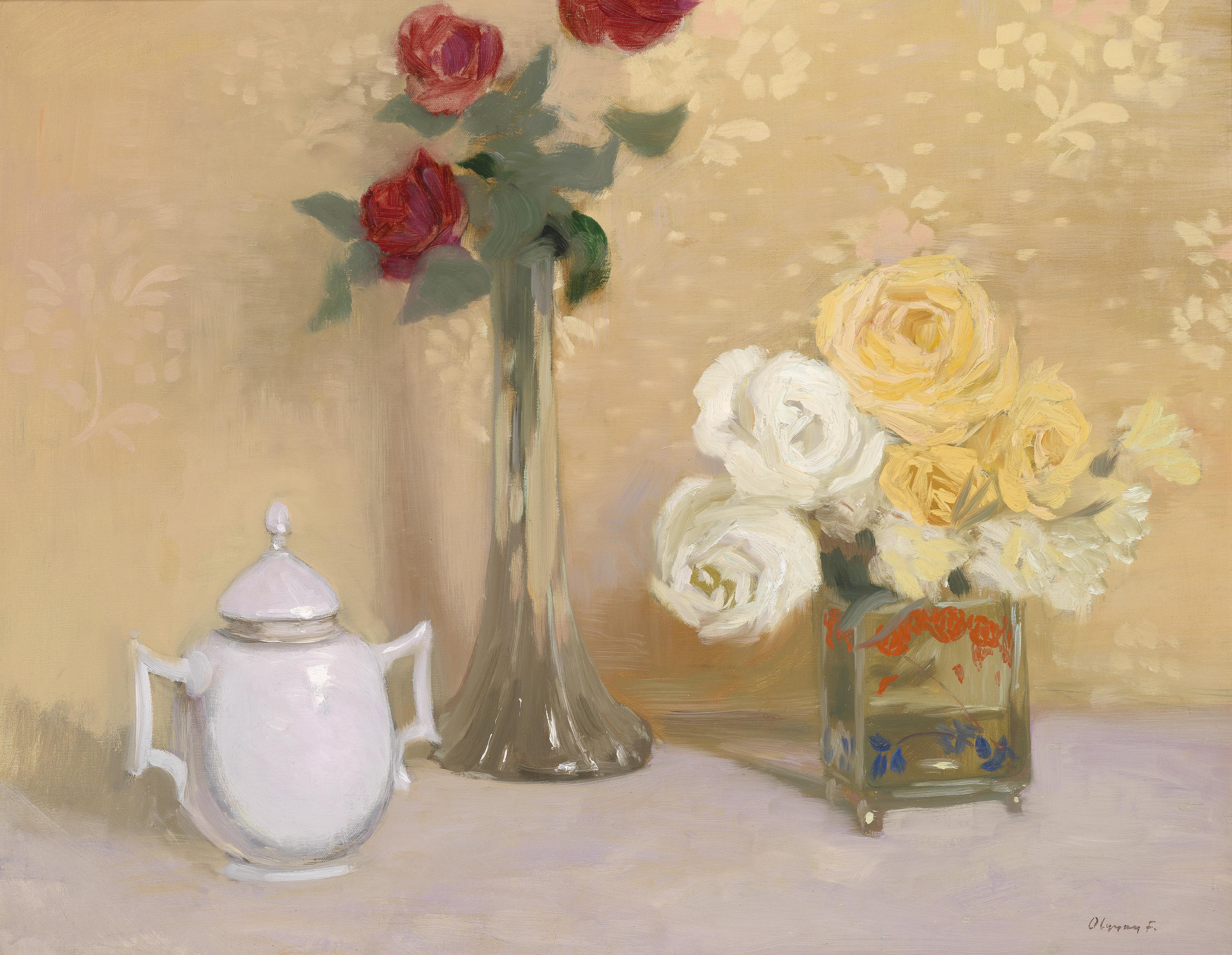 Stillleben mit Rosen, signiert Olgyay F., rückseitig Reste eines Etiketts, Öl auf Leinwand,50 x 63 cm